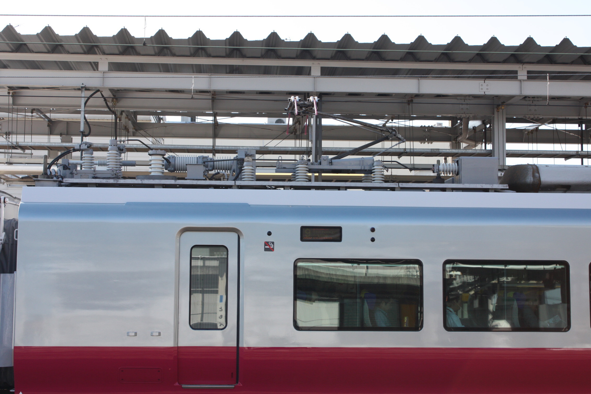 E653系のパンタグラフ